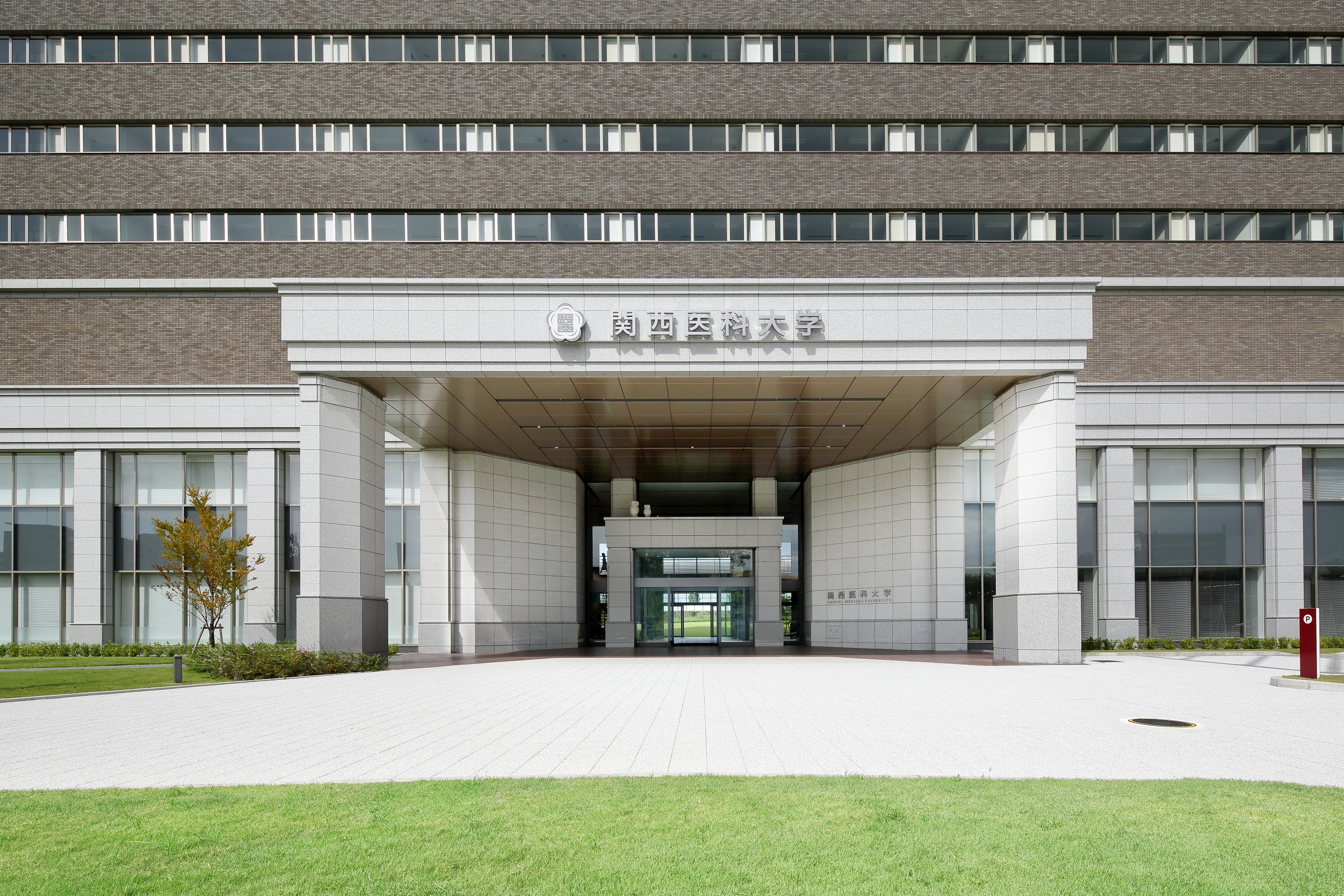 学校法人関西医科大学医科大学の正門です。